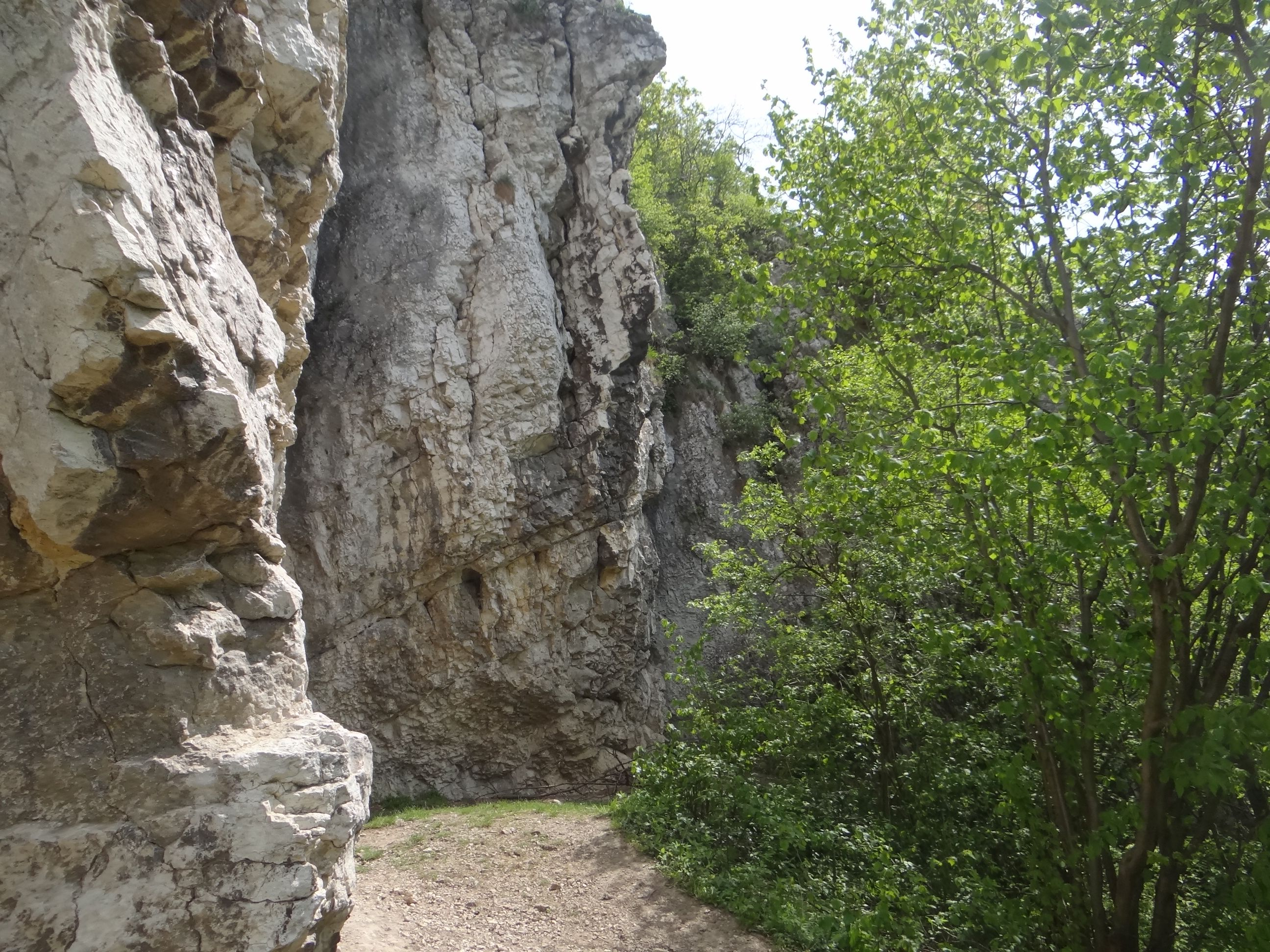 Skały Lotniki w Dolinie Kobylańskiej